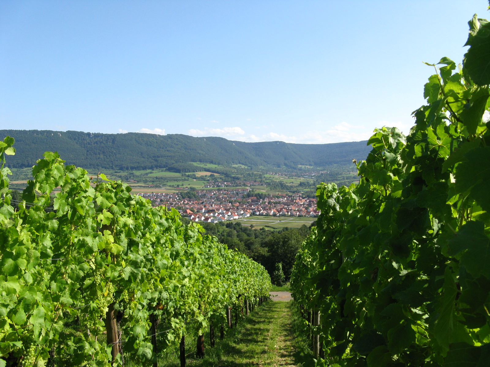 Neuhausen an der Erms (Ortsteil von Metzingen), gesehehen von den Metzinger Weinbergen (Metzinger Weininsel)